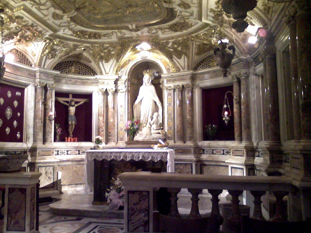 Interno della cripta del santuario di Savona (Italy)